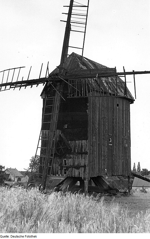 Original image description from the Deutsche Fotothek Niedergörsdorf-Bochow. Bockmühle